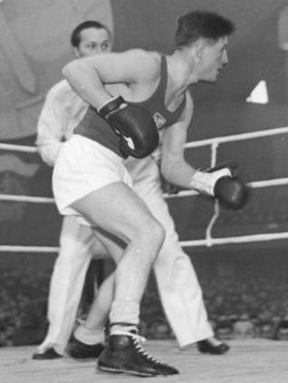 Drogosz, Zachara Zentralbild V. 4.3.1952 Internationaler Boxkampf in Wroclaw. Am 17. Februar 1952 fand in Wroclaw in der Republik Polen ein Boxkampf zwischen einer polnischen und tschechoslowakischen Boxmannschaft statt. Die Polnischen Boxer siegten mit 14:6. UBz:Die Federgewichtler Drogosz (Polen) und Zachara (CSR) beim Kampf.